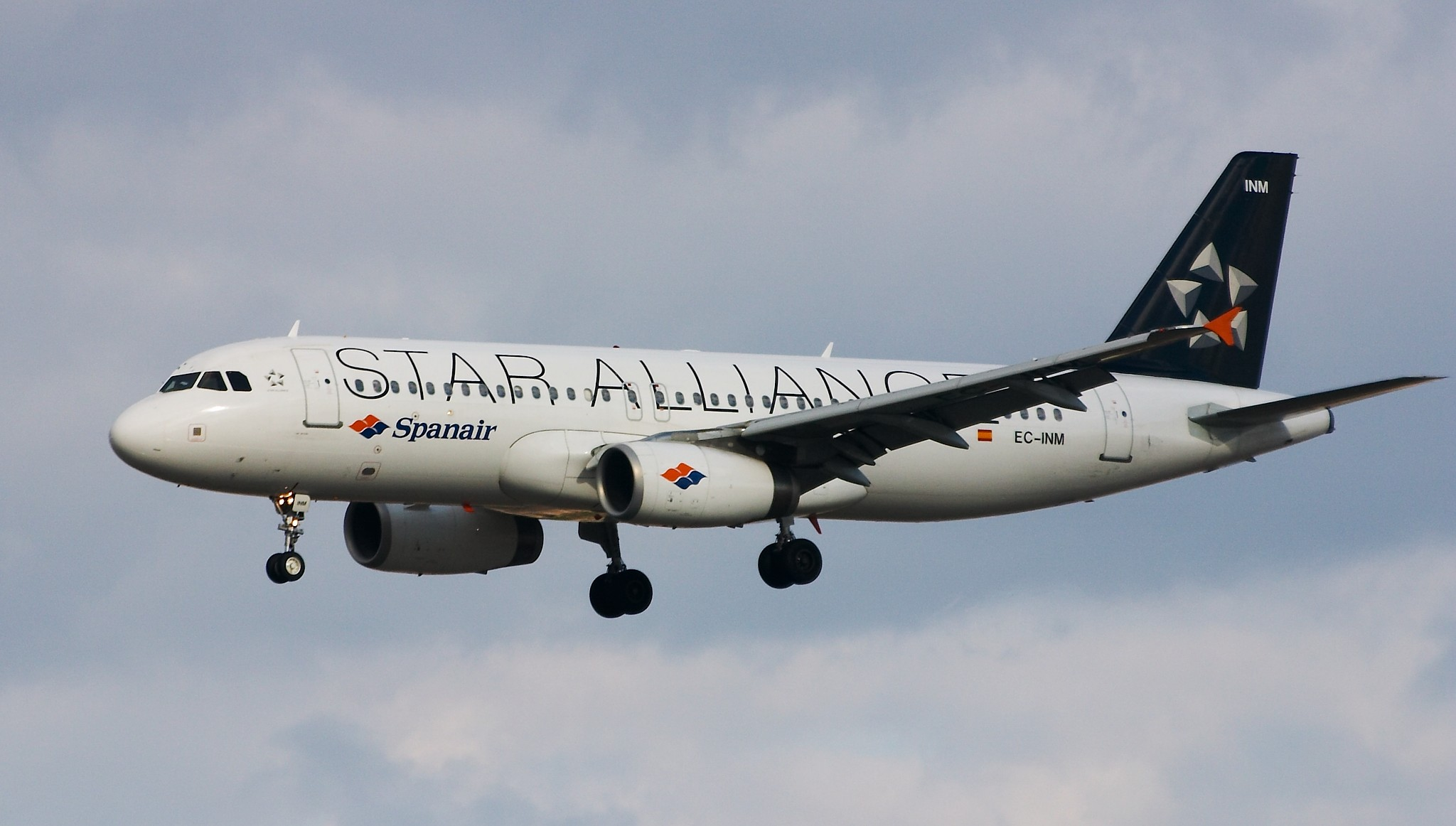 Airbus A320-232 de Spanair a punto de aterrizar en la pista 33 del aeeropuerto de Madrid Barajas.